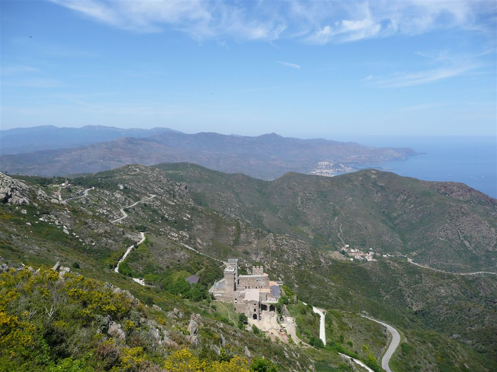 El monestir de Sant Pere de Rodes (el Port de la Selva, Alt Empordà, Catalunya) des del castell de Verdera. Al fons, la Vall de Santa Creu, més enllà Llançà i a l'esquerra l'antic poble de Santa Creu de Rodes, amb l'església de Santa Helena.